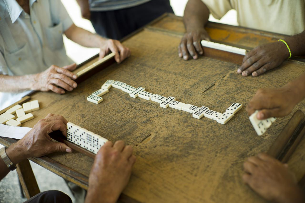 cuba libre